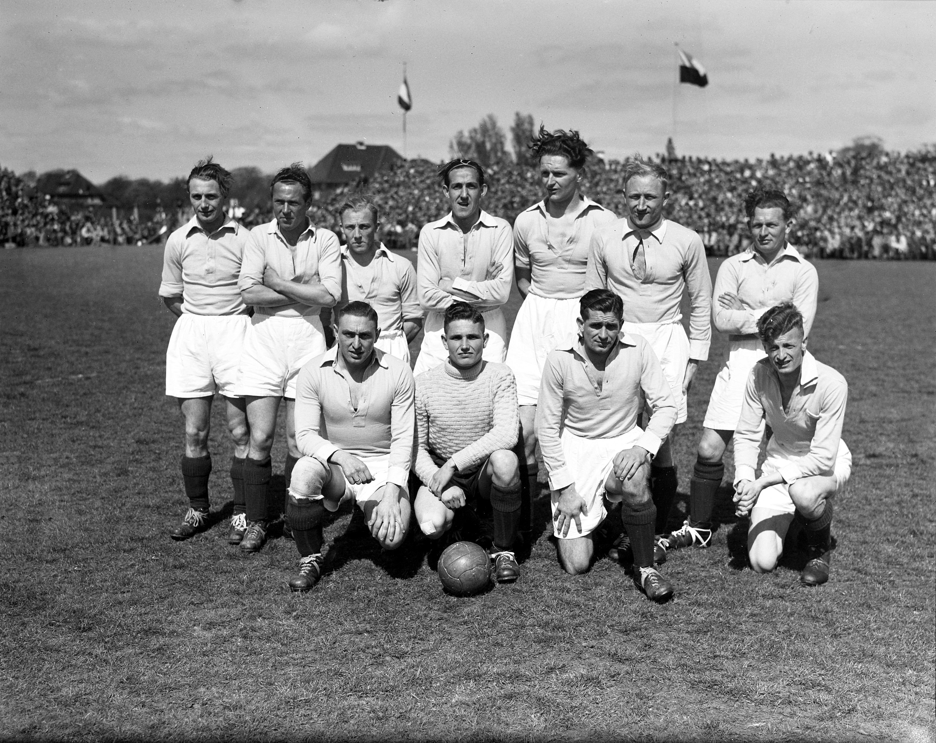 Collectie / Archief : Fotocollectie Anefo Reportage / Serie : [ onbekend ] Beschrijving : VSV elftal voetbal Datum : 26 april 1949 Trefwoorden : elftallen Fotograaf : Noske, J.D. / Anefo Auteursrechthebbende : Nationaal Archief Materiaalsoort : Glasnegatief Nummer archiefinventaris : bekijk toegang 2.24.01.09 Bestanddeelnummer : 903-3472